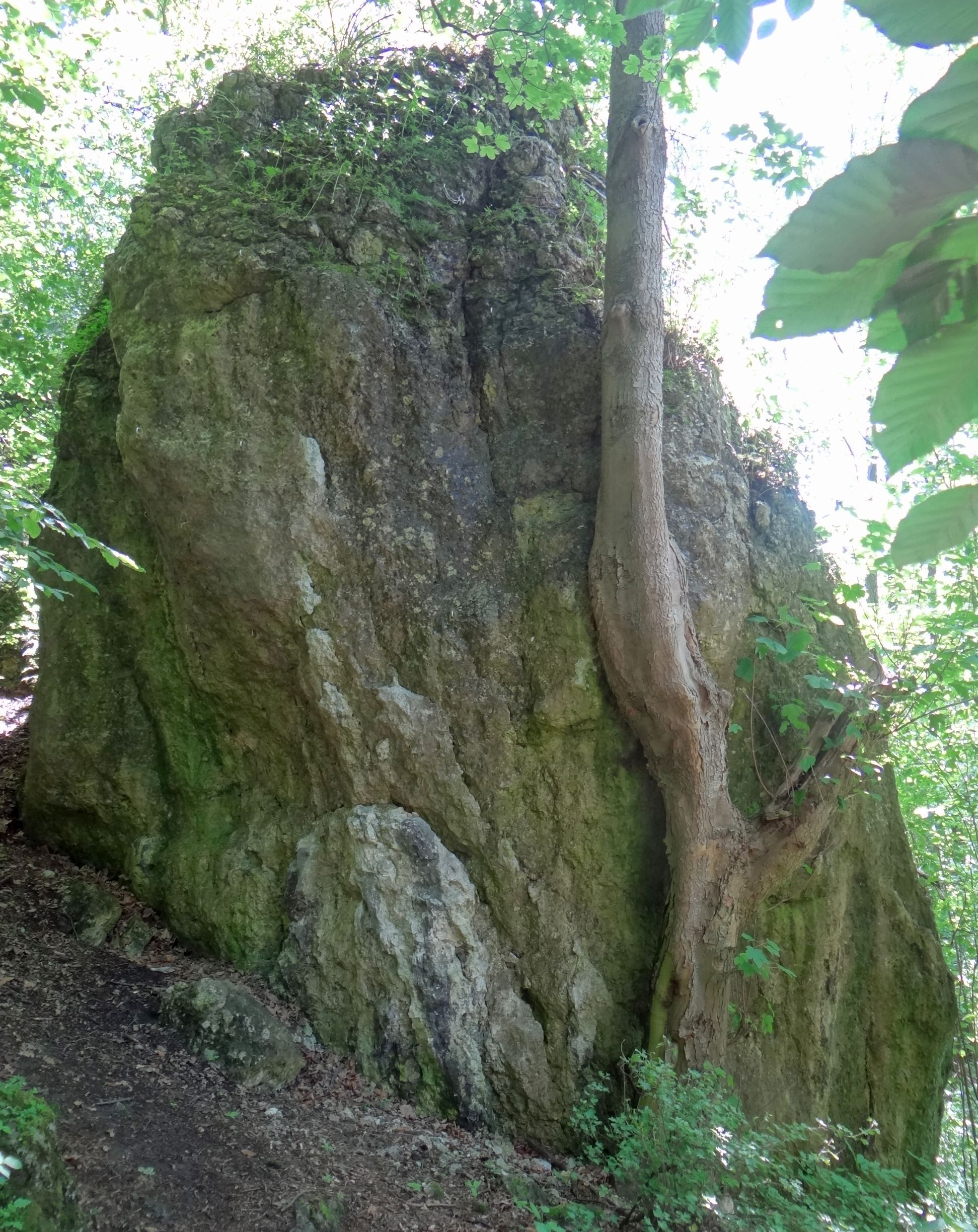 Drzewna Skała w grupie Węzich Skal w Dolinie Brzoskwini